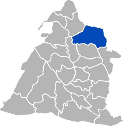 彰化市位置圖 本人nuker依照KaurJmeb的底圖於2005年2月1日創作。 2005年10月1日更新 --愛索 11:29 2005年10月1日 (UTC)